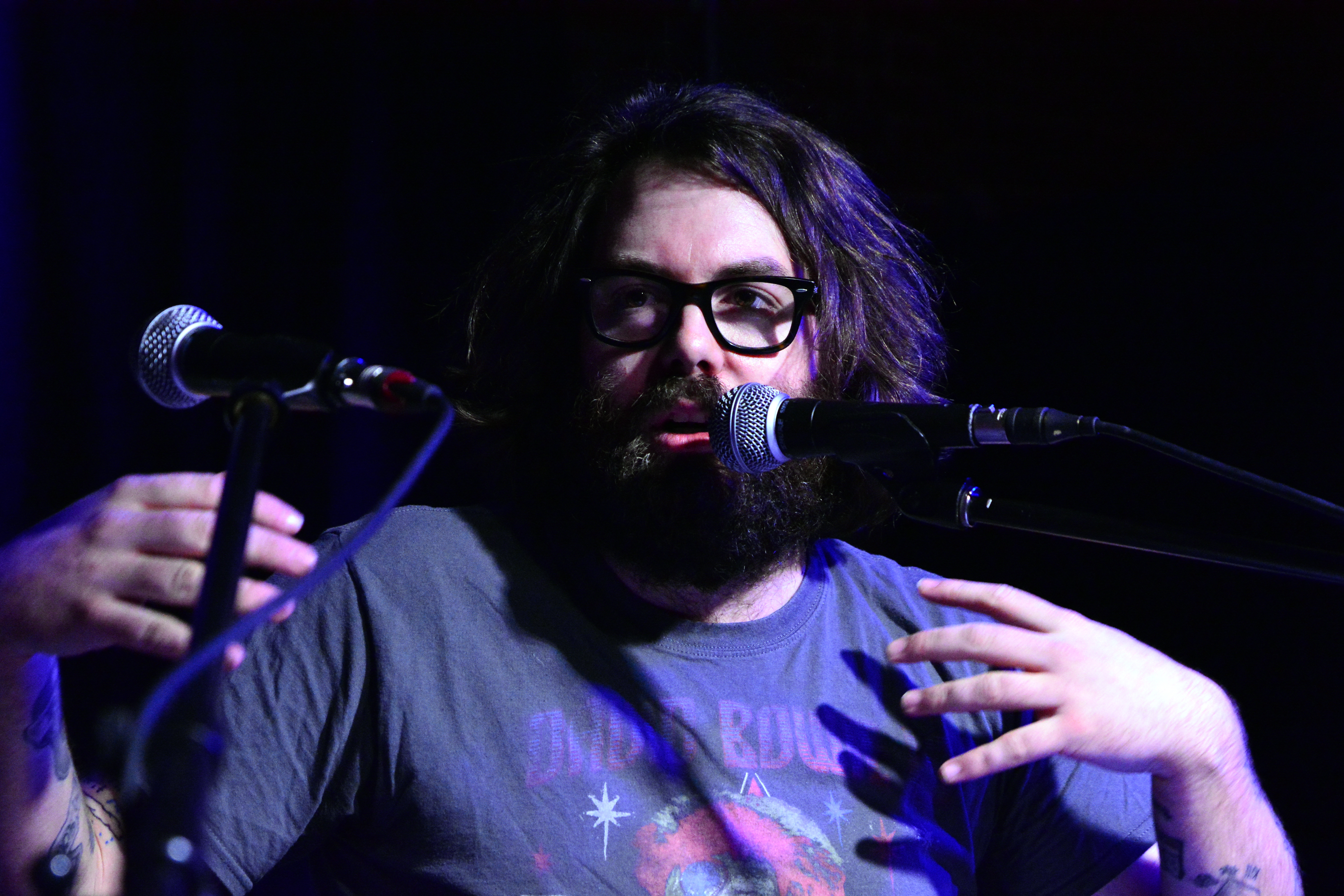 John Allen im Nochtspeicher Hamburg